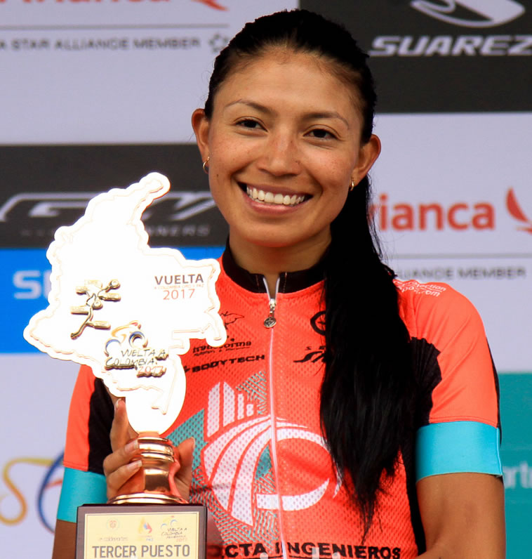 Liliana Moreno 3ra en la Vuelta a Colombia Femenina 2017